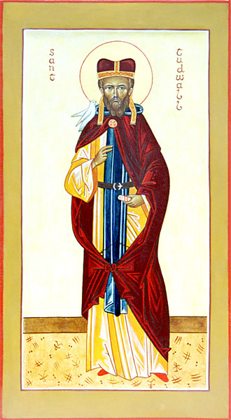 L'icône de St. Tugdual de Tréguier peinte pour l'Association orthodoxe sainte Anne (Bretagne).